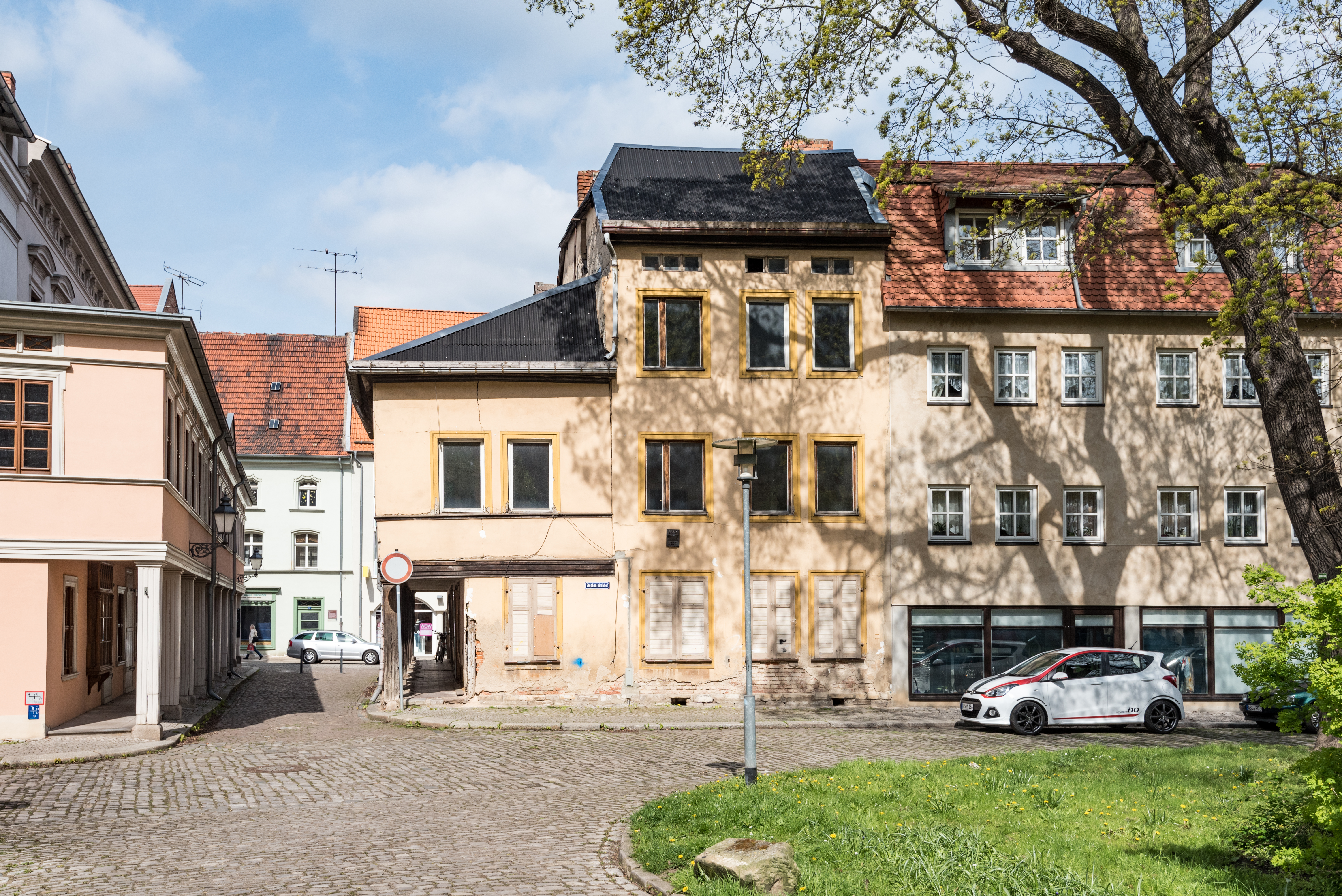 Aschersleben, Stephanikirchhof 19